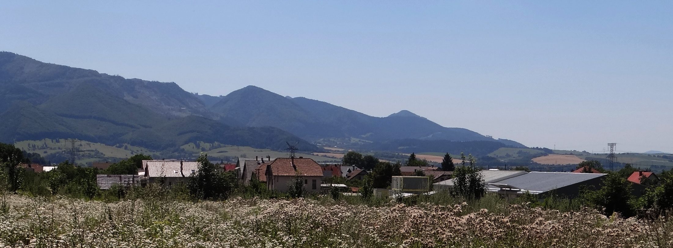 Krasňany